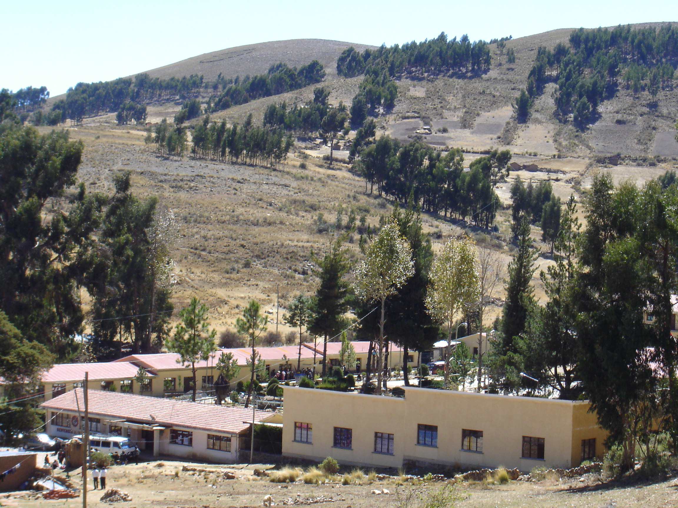 Vista panorámica del edificio central del Instituto Normal Superior Ismael Montes de Vacas